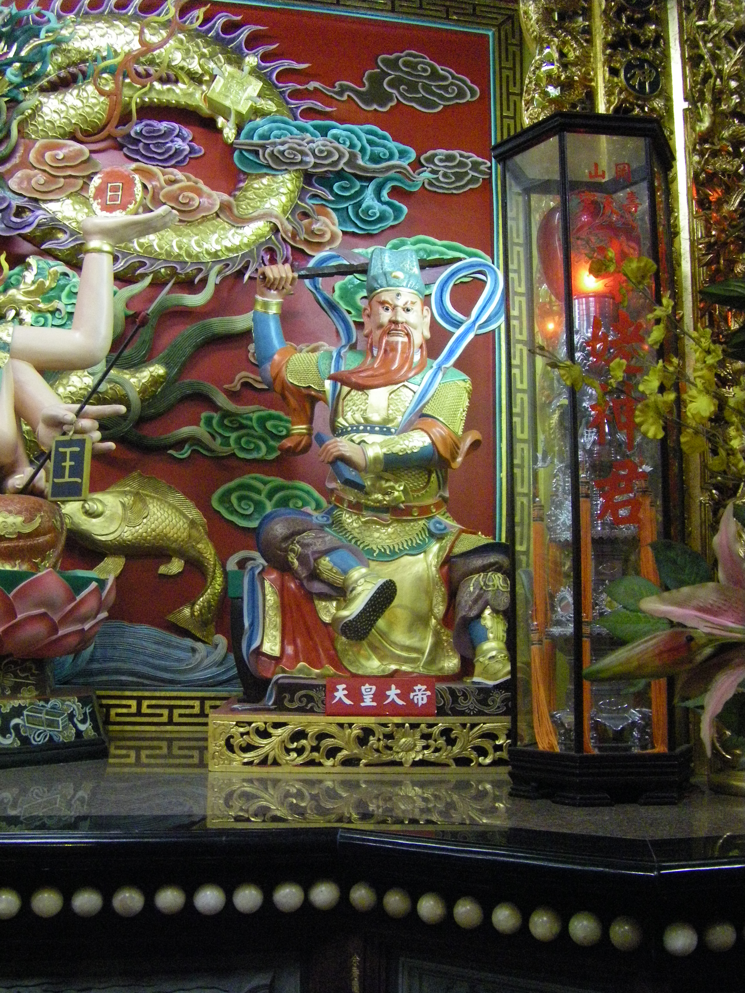 中文（台灣）: 岡山壽天宮供奉的天皇大帝